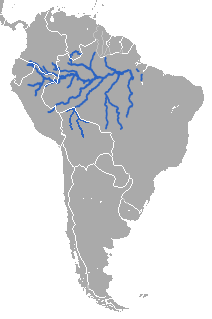 Amazonian manatee range.